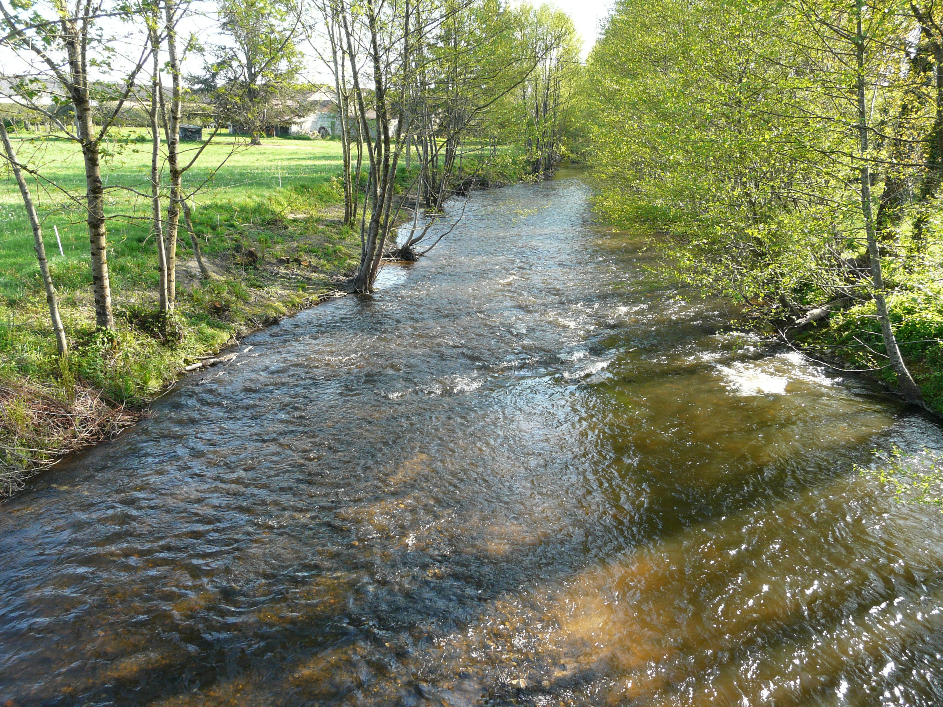 La Dronne en aval du pont de Pombol, Saint-Front-la-Rivière, Dordogne, France